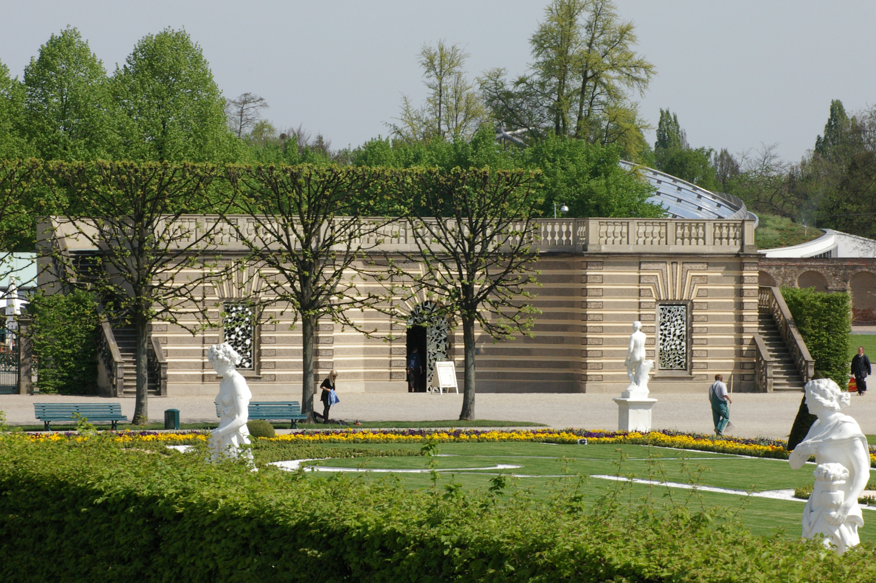 Hannover - Herrenhausen - Großer Garten - Grotte. 2005-05-02